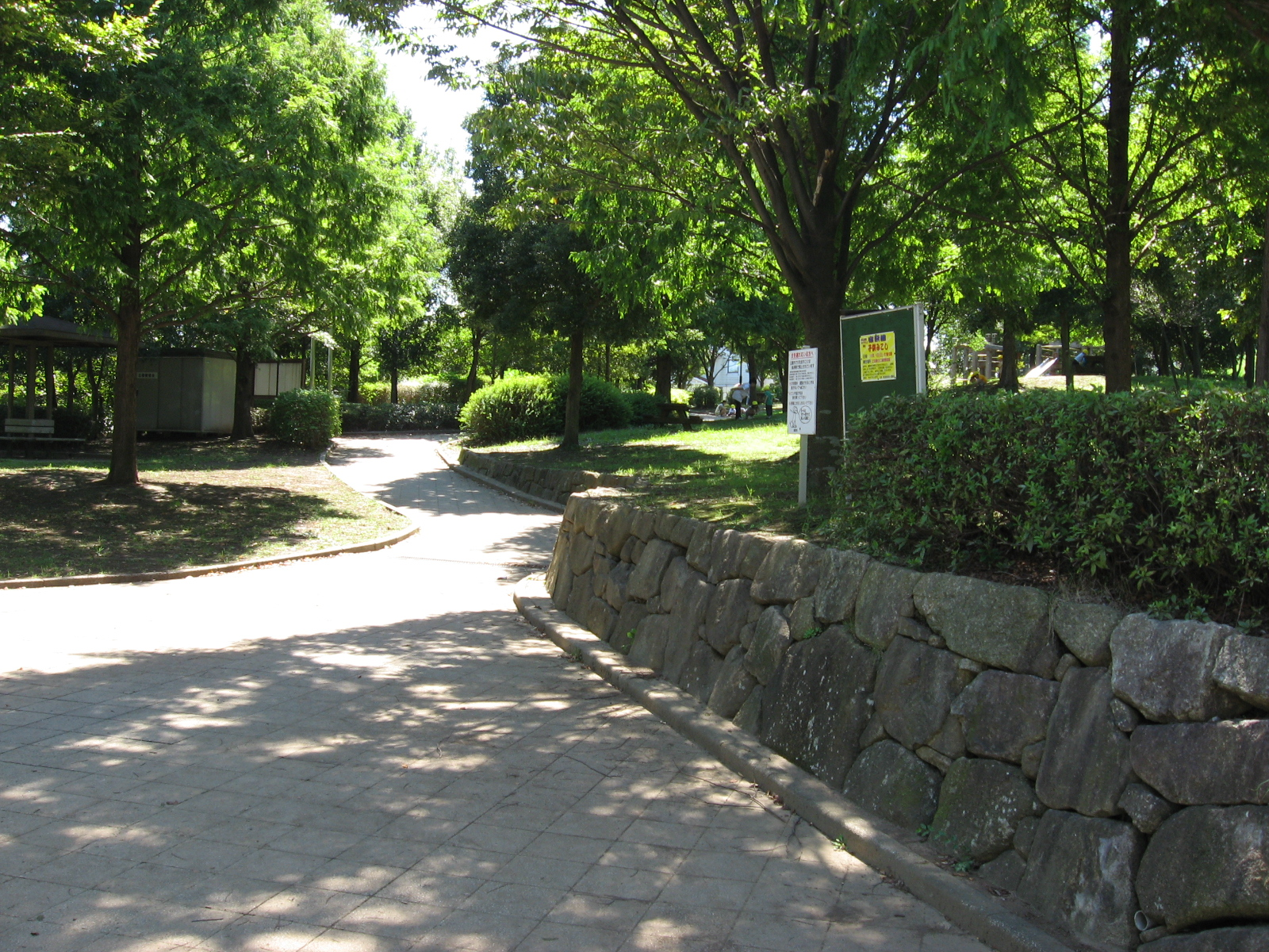 あざみ野南3丁目の赤田西公園